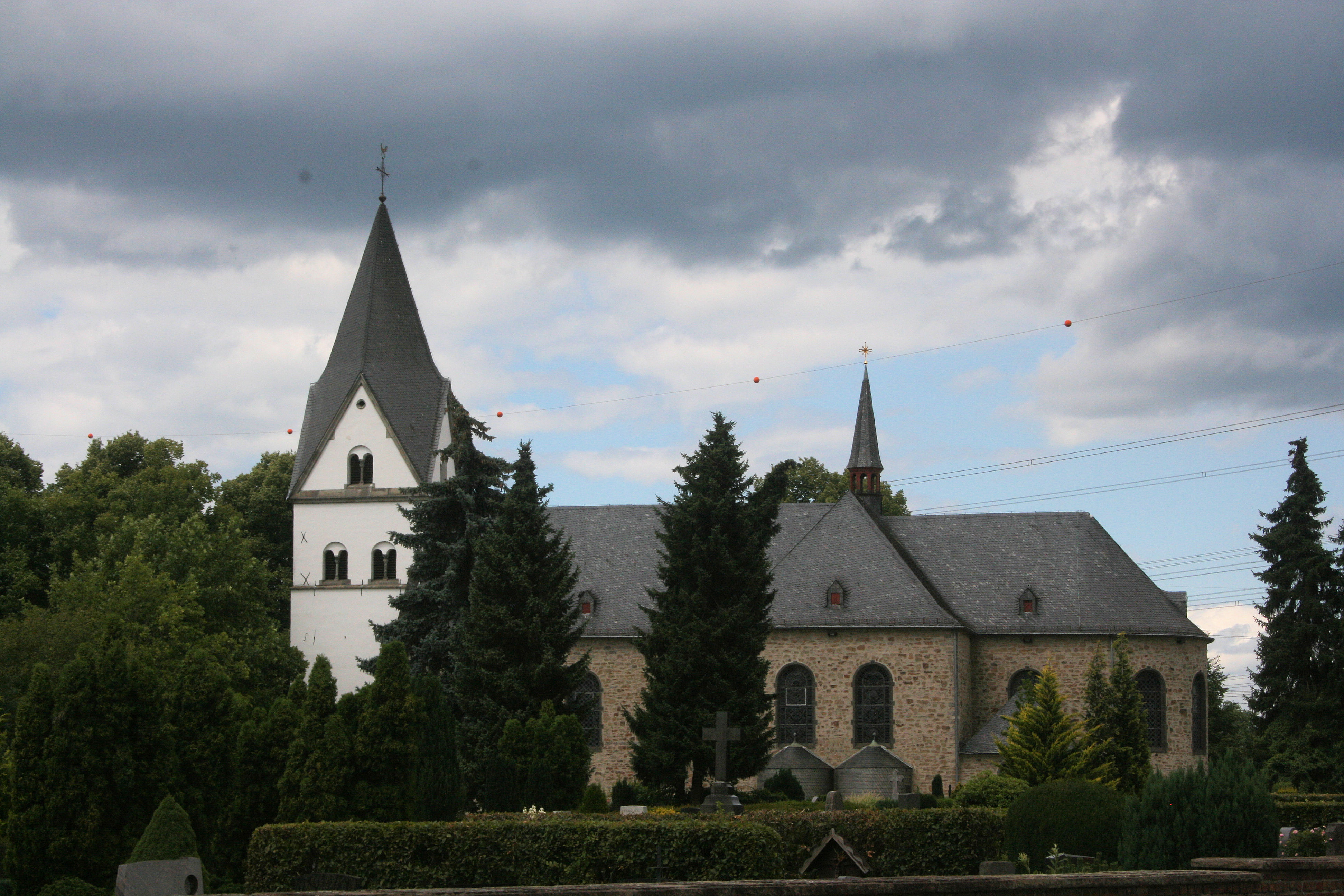 Katholische Kirche St. Martinus in Sankt Augustin-Niederpleis